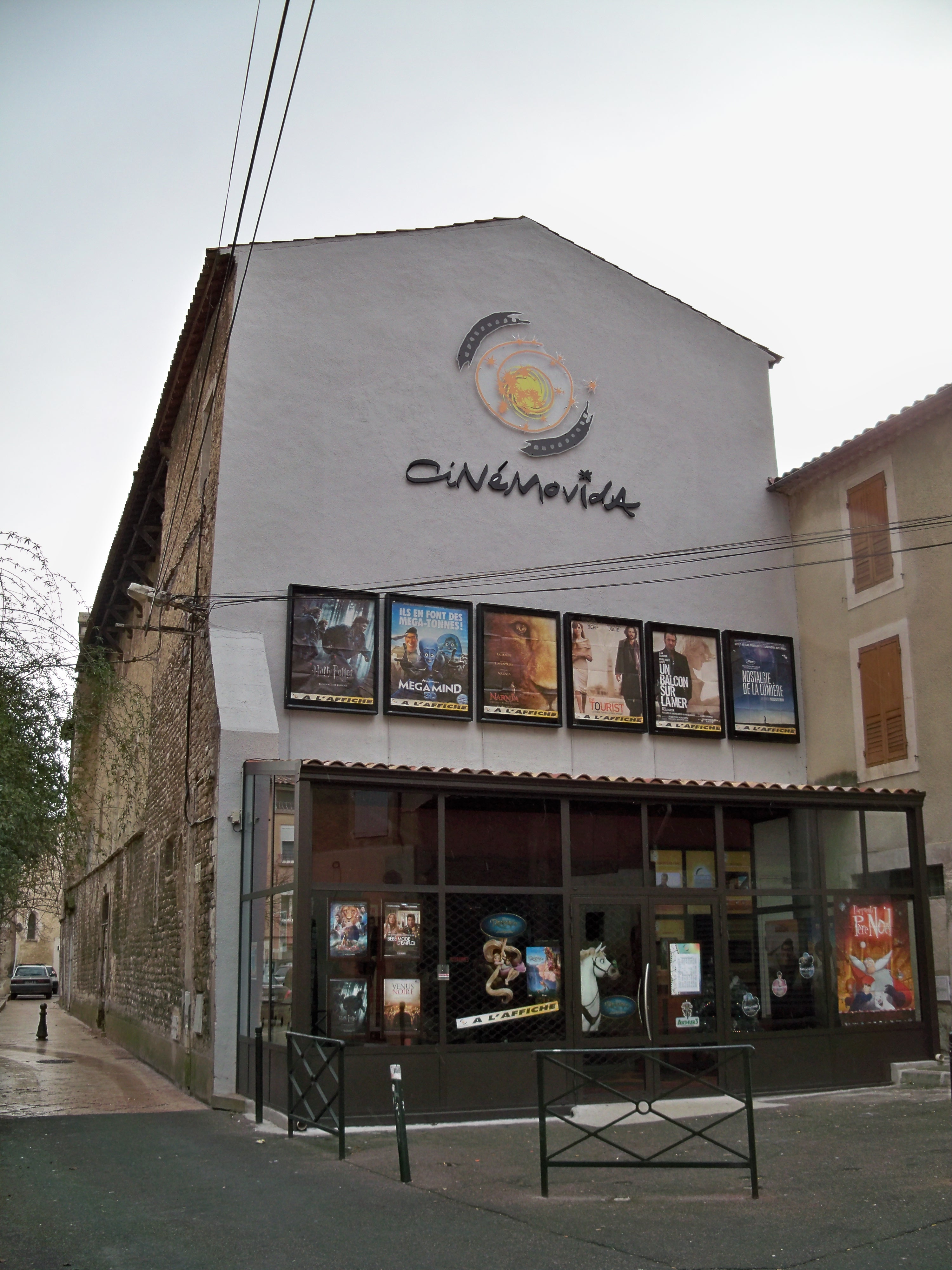 Cinéma le César dénommé Cinémovida à Apt, Vaucluse, France